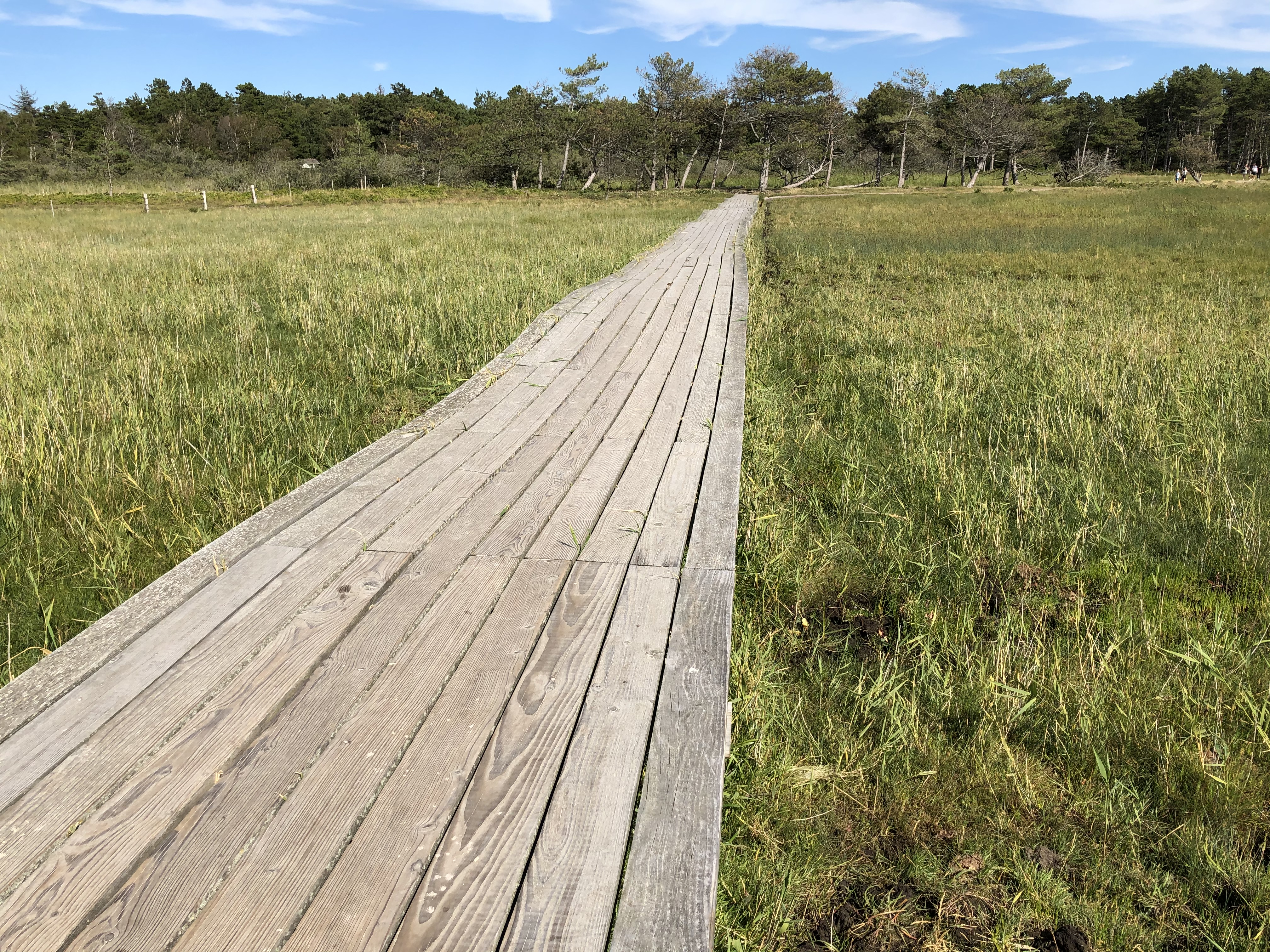 Bræddevej